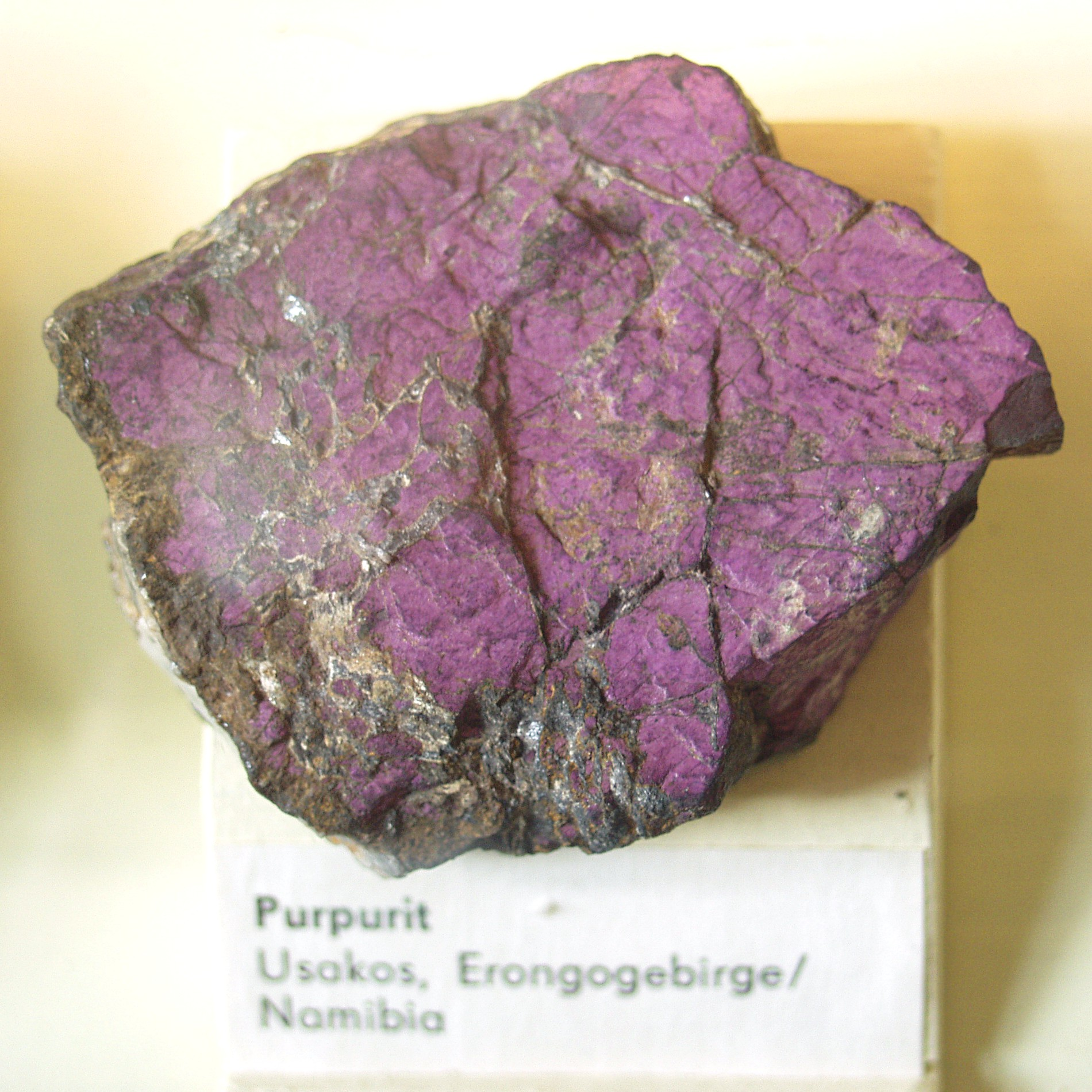 Purpurit - Usakos, Erongogebirge, Namibia. Museum für Naturkunde (Berlin).